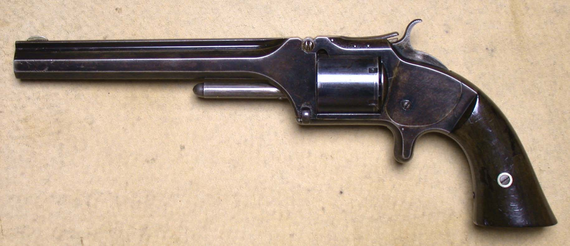 Smith & Wesson Army No 2 cal .32 Rimfire, 6 Shot